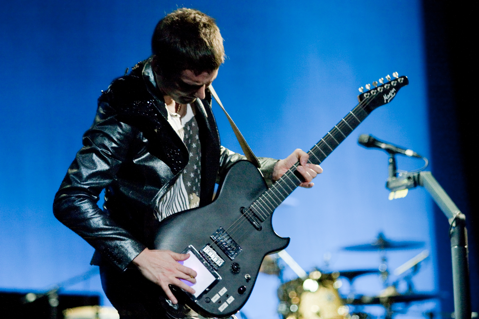 Muse-6